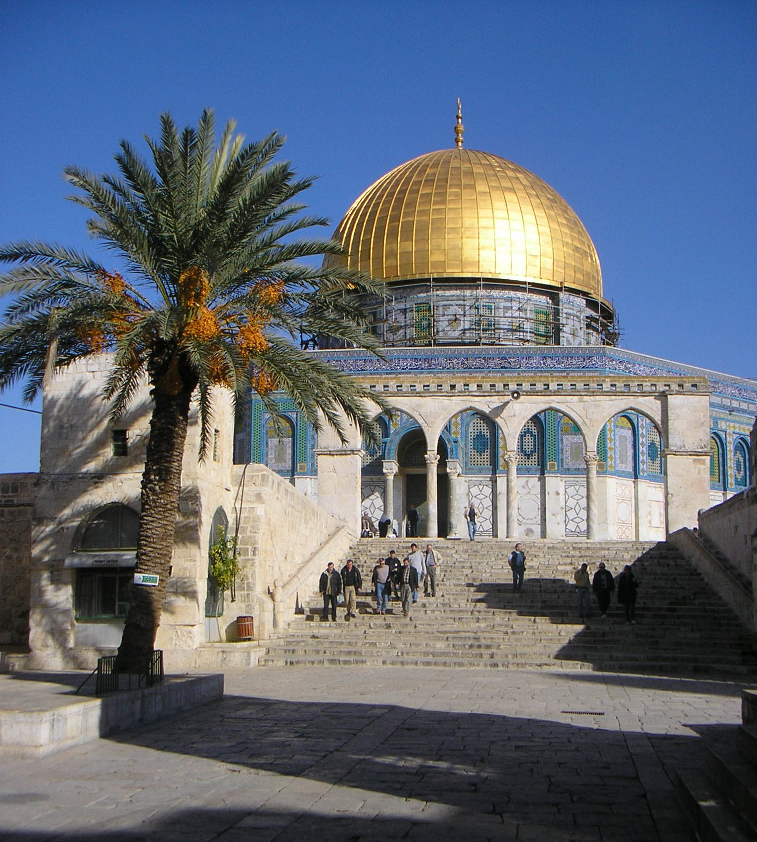 כיפת הסלע. צילום: אריאל הורוביץ